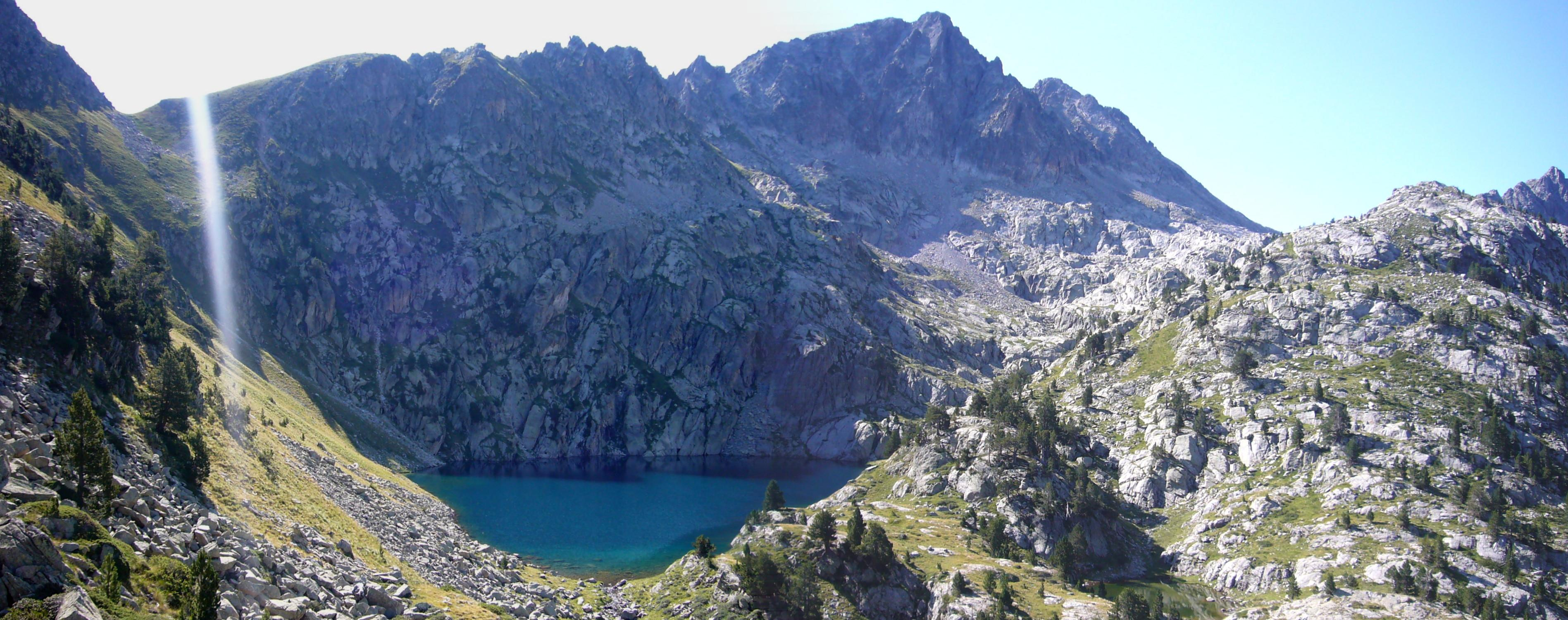 Estany Nere i part inferior de la Coma dels Pescadors; Espot, Pallars Sobirà, Catalunya